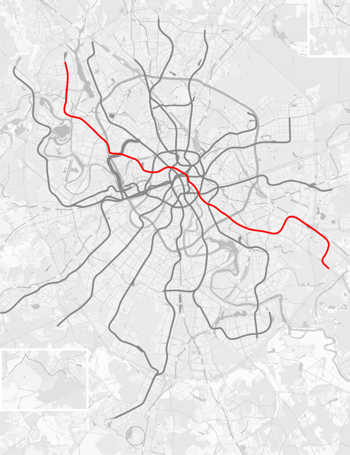 Таганско-Краснопресненская линия Московского метрополитена